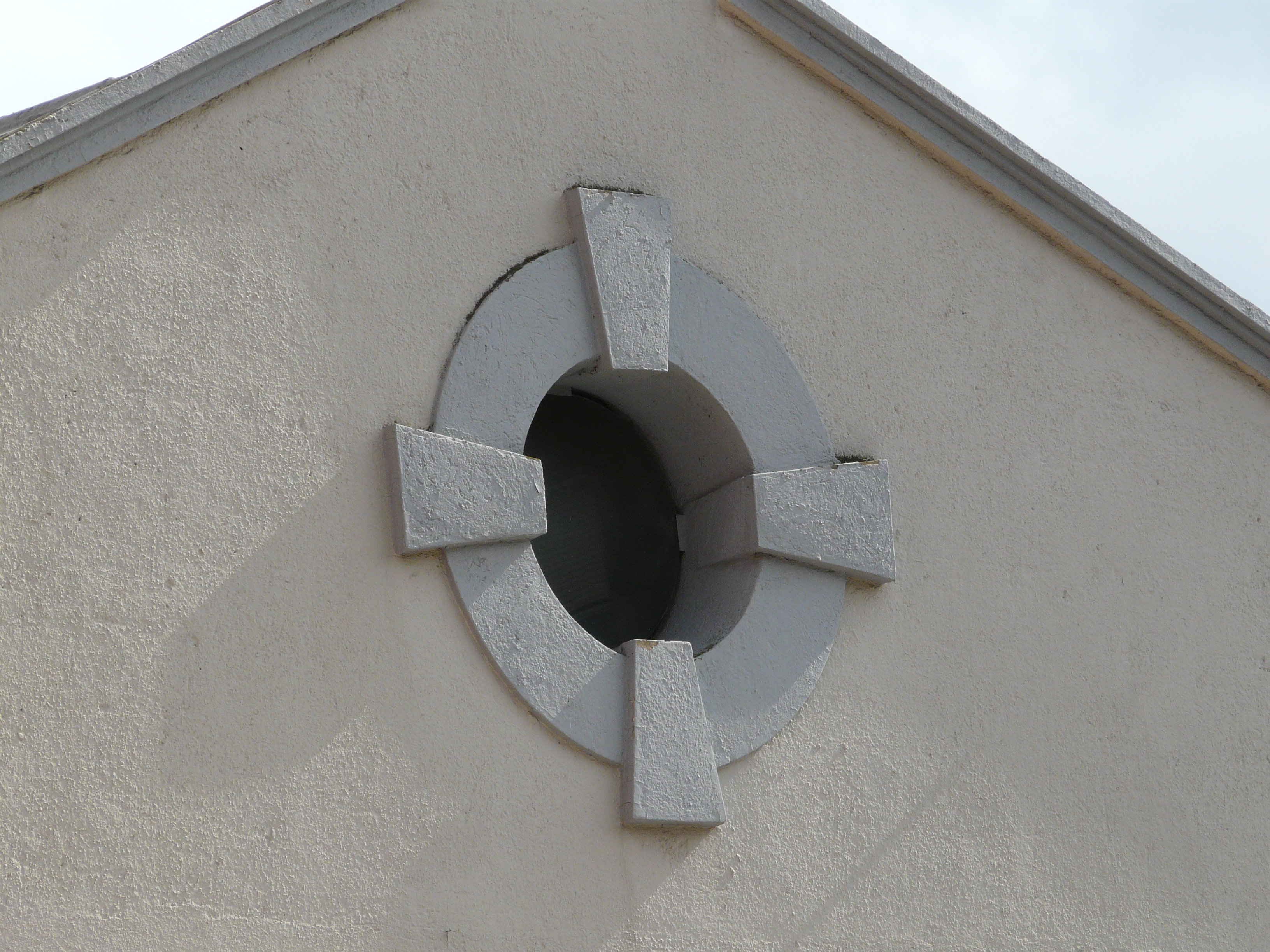 Antic escorxador municipal (Sant Feliu de Llobregat) Object location41° 22′ 43.86″ N, 2° 02′ 27.37″ E